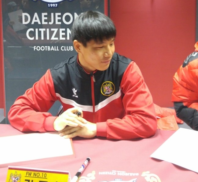 대전시티즌 소속의 김동찬